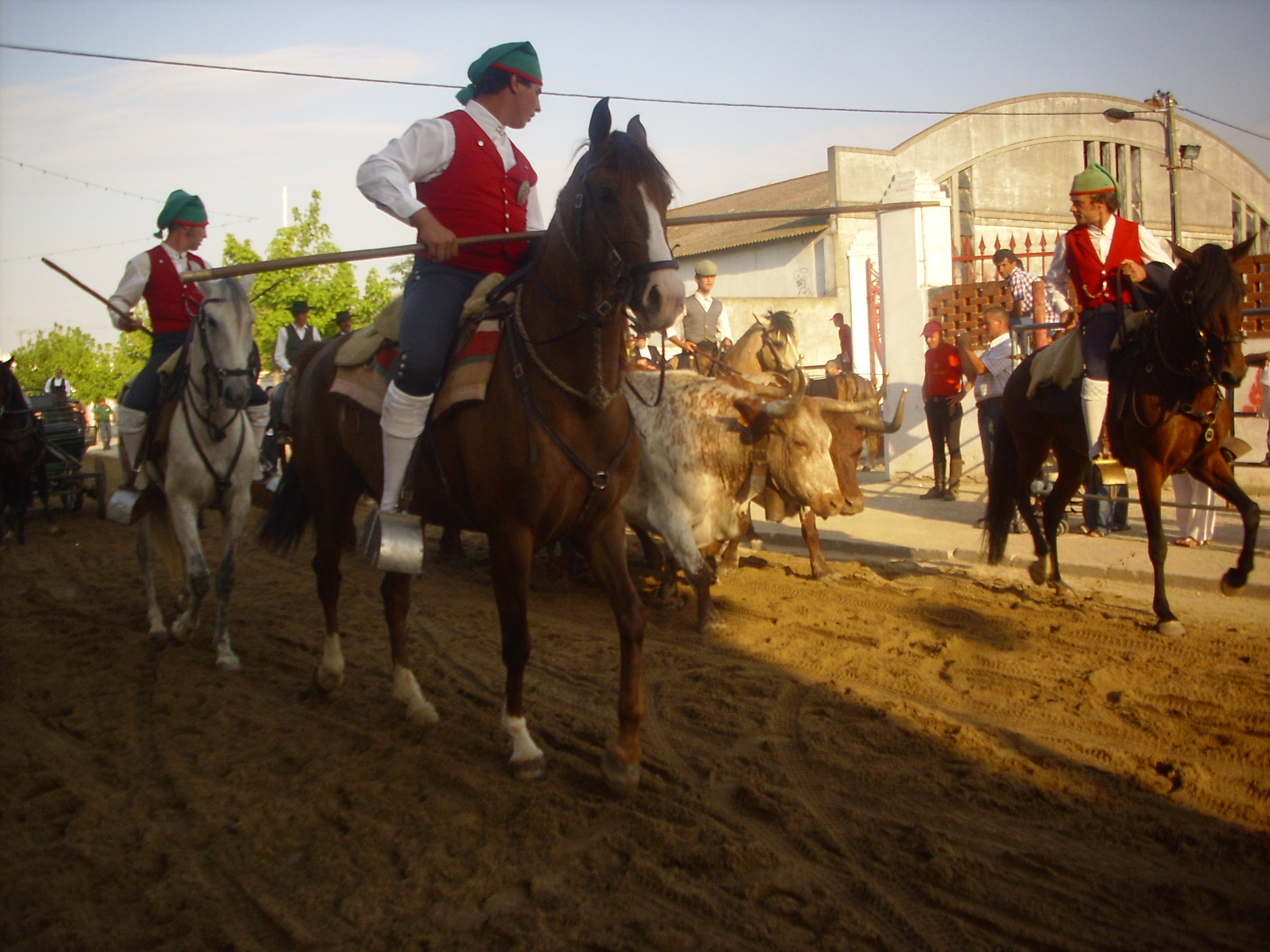 Festas de S. Pedro - Montijo